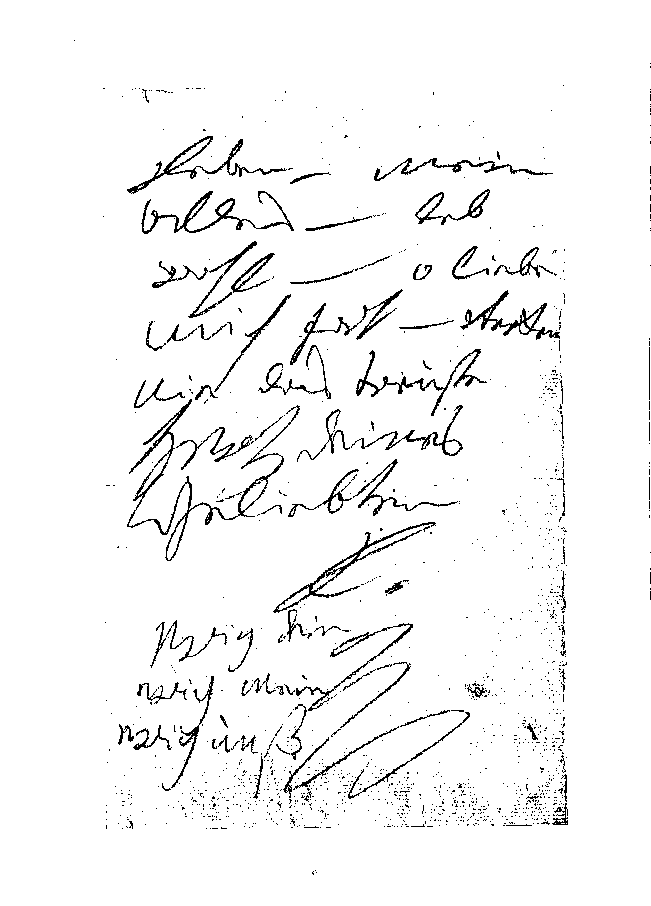 Faksimile des Briefes von Ludwig van Beethoven vom 6./7. Juli 1812 aus Teplitz an eine unbekannte Adressatin, genannt die "Unsterbliche Geliebte".